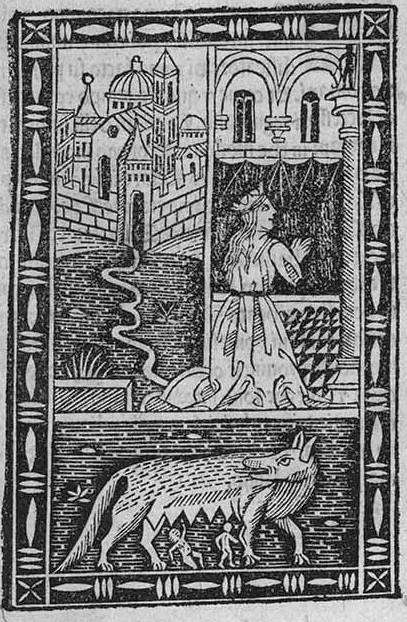 illustrazione